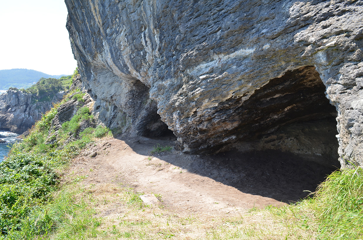 Antzoriz I / Santa Katalina kobazuloko aztarnategia (Lekeitio), 2015eko egokitze lanen ostean.